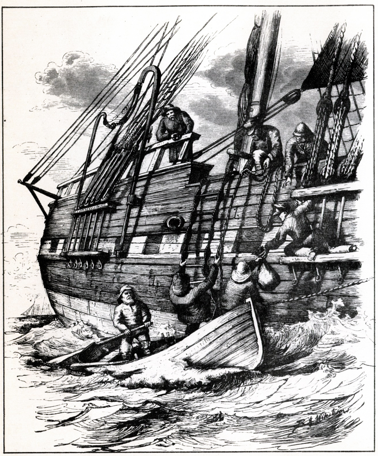 Lots går ombord på en skonare — äntrar från jullen uppför den uthängda fallrepslejdaren. På däck syns bland annat skeppare med kikaren i hand. Xylografi efter teckning av B. A. Wikström i Ny illustrerad tidning 1882